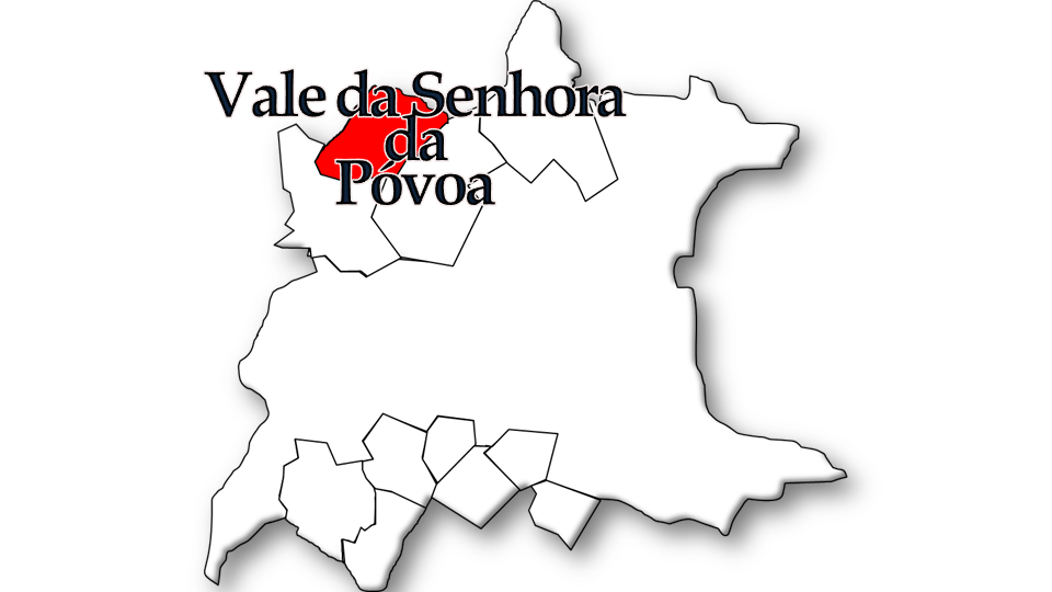 População